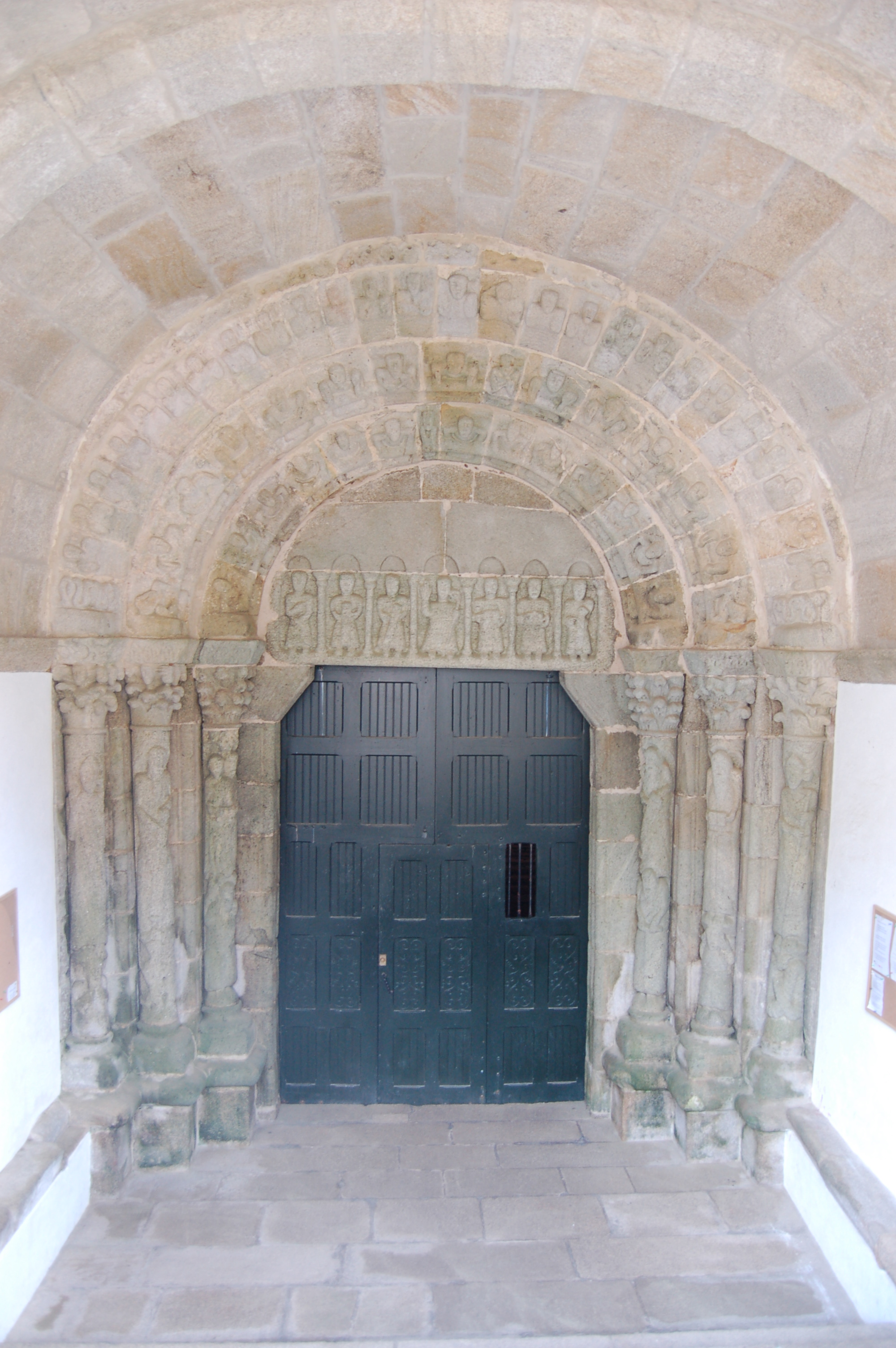 Porta principal da igrexa de San Xulián de Moraime, en Moraime (Muxía).